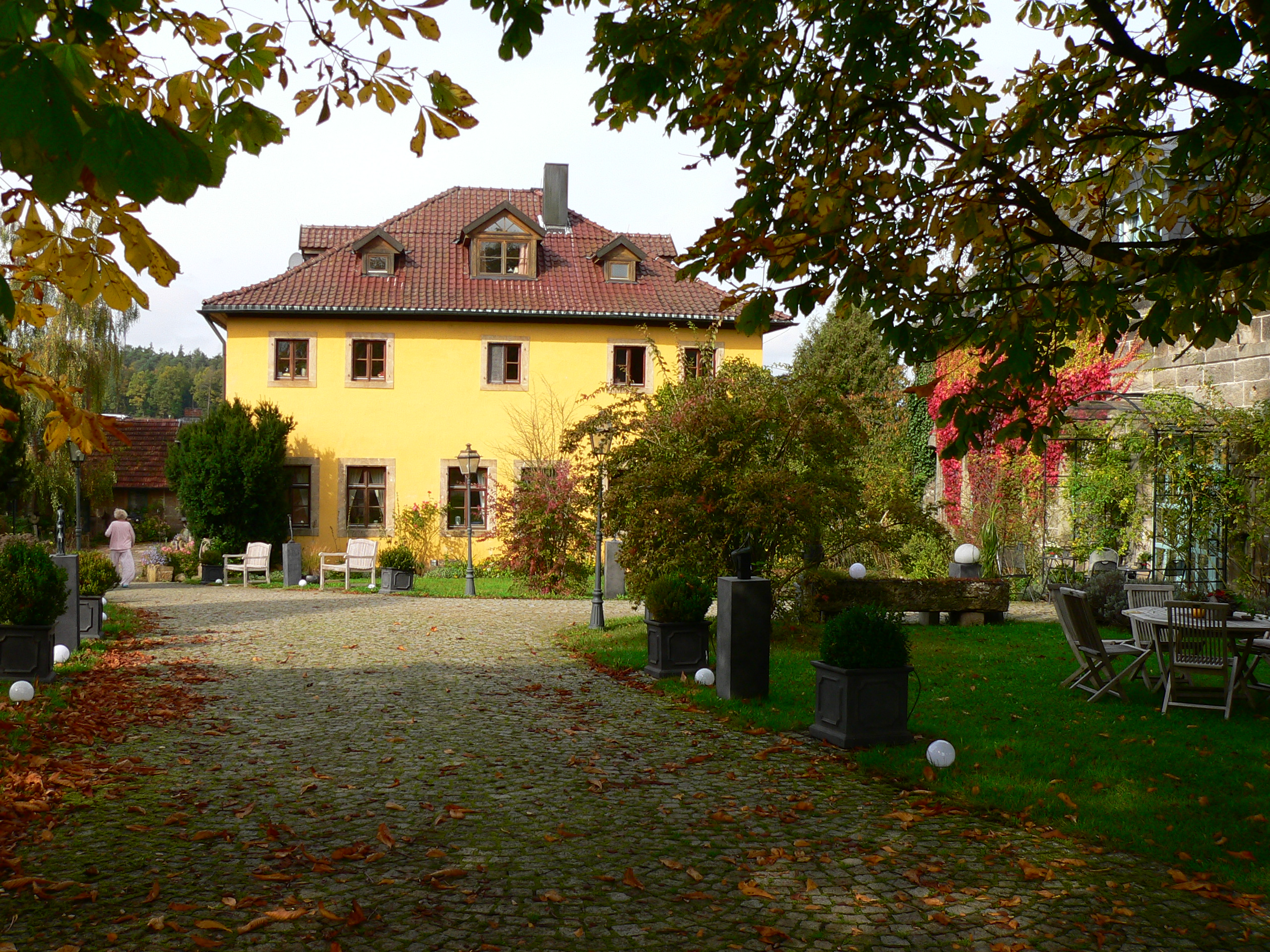 Schloss Wasmuthhausen in Maroldsweisach-Wasmuthhausen, Bayern, Unterfranken, Landkreis Haßberge